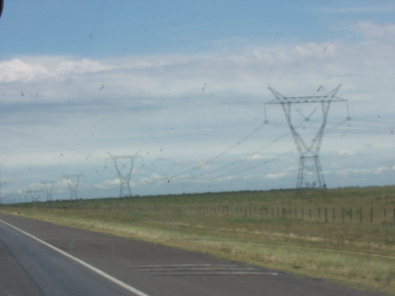 Postes de alta tensión que transportan la energía eléctrica de Yacyreta hacia la Capital Federal, en la Argentina.